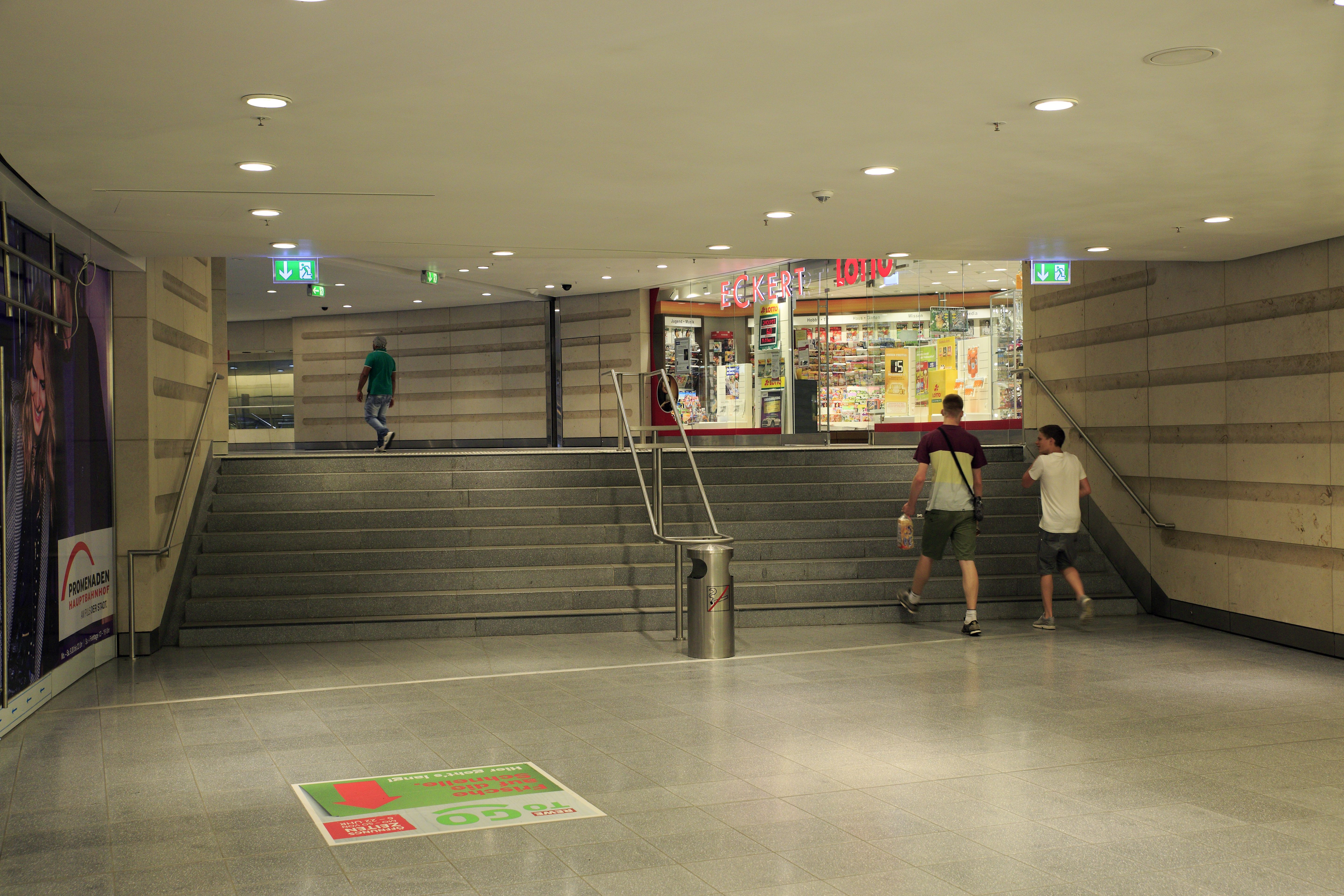 Treppe im neuen Personentunnel Richtung Stadt, an dieser Stelle vollkommen unnötig und für Gehbehinderte nicht zu passieren. Nach Aussagen der Planer war hier keine Barrierefreiheit gefordert. Platz für eine Rampe wäre vorhanden. Darauf, dass Gehbehindete und Rollstuhlnutzer für Umwege besonders empfindlich sind, hätten die in diesem Fall wohl deutlich überbezahlten Projektanten und auch ihre (ebenfalls überbezahlten) Auftraggeber eigentlich selber kommen müssen.